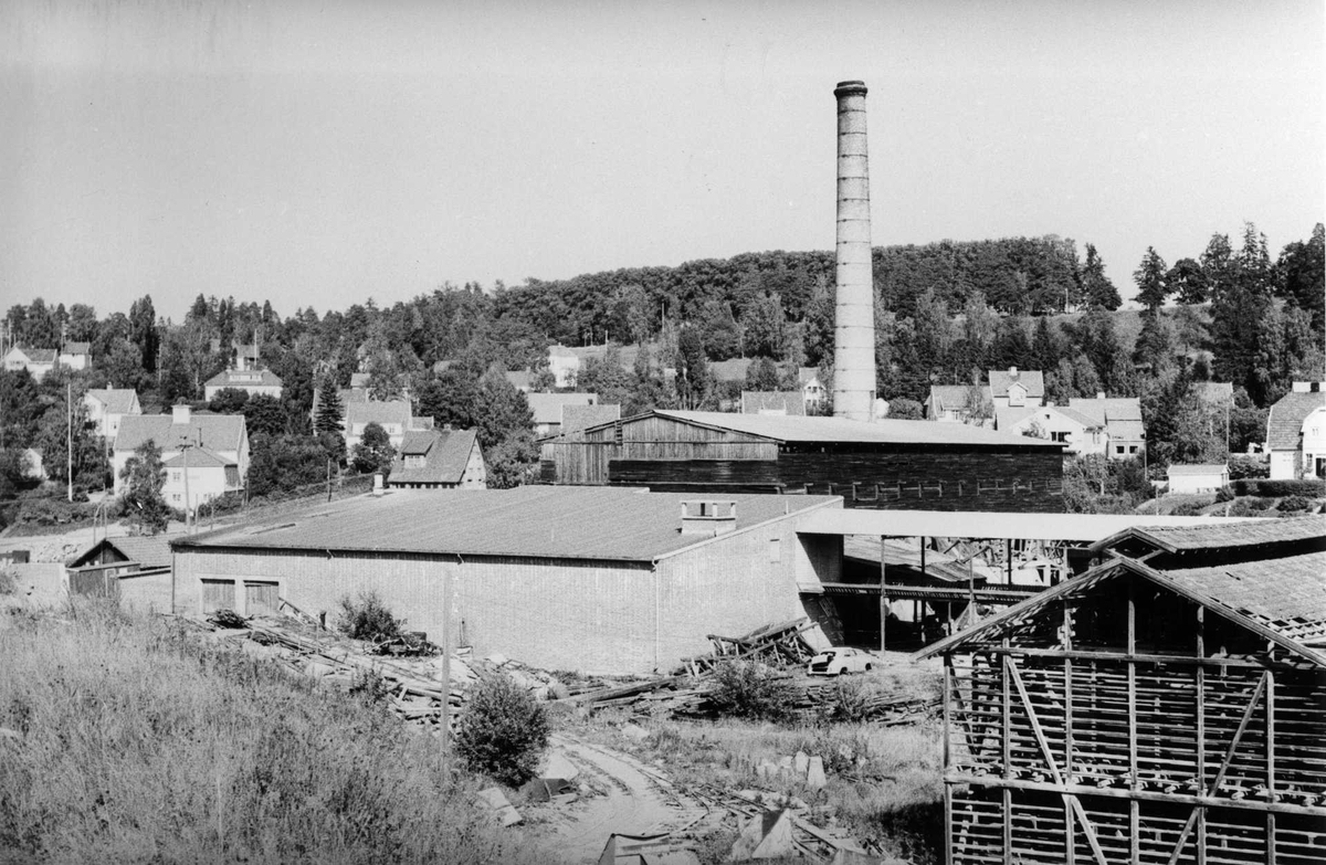 Høyenhall teglverk i Oslo.